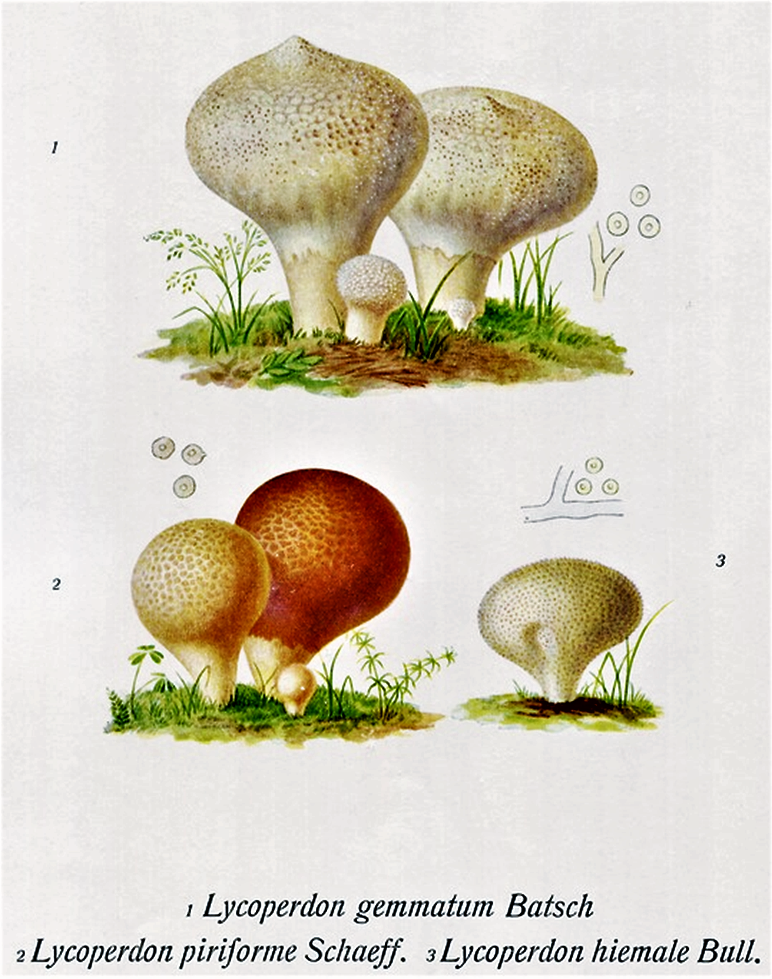 Giacomo Bresadola: 3 Arten Lycoperdon